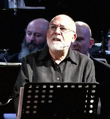 Salvador Vidal, en abril de 2015.